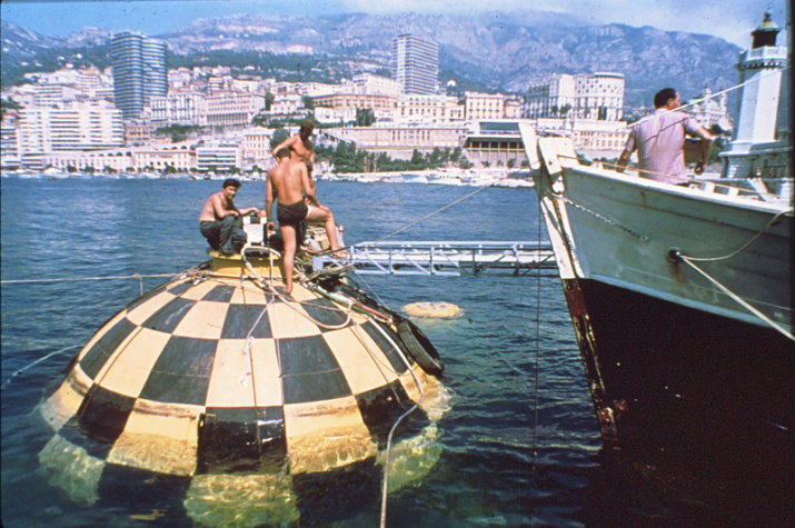 Expérience Précontinent 3 Chef de la mission André LABAN